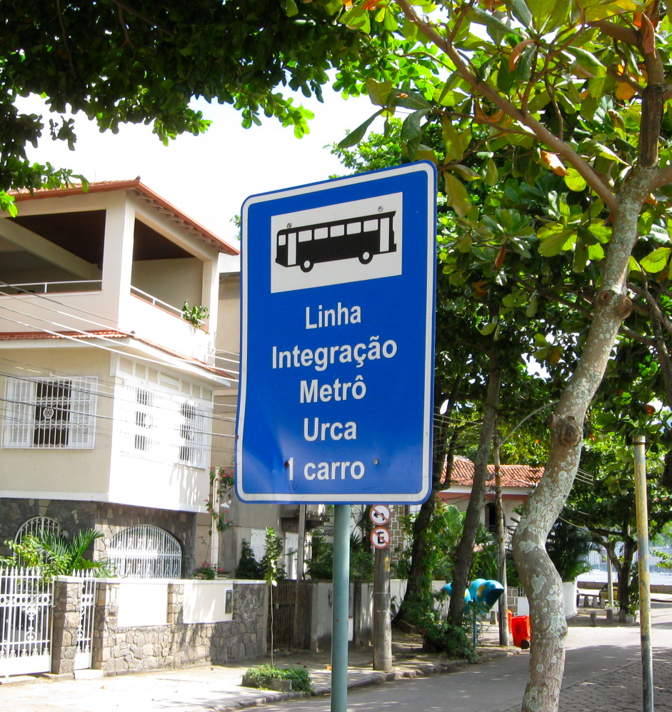 Placa de integração ônibus–metrô, Urca